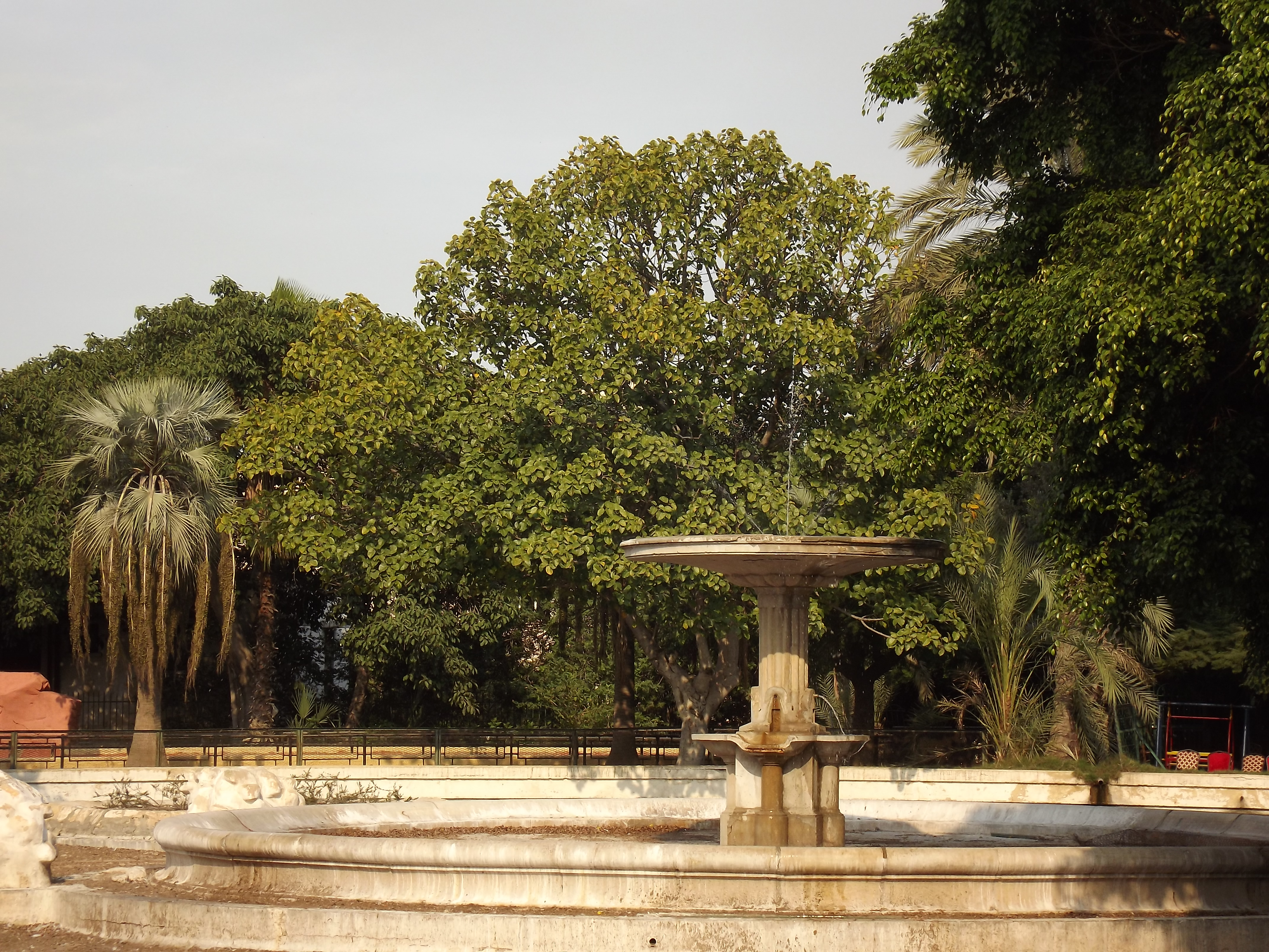 حديقة حيوان النزهة - الاسكندرية